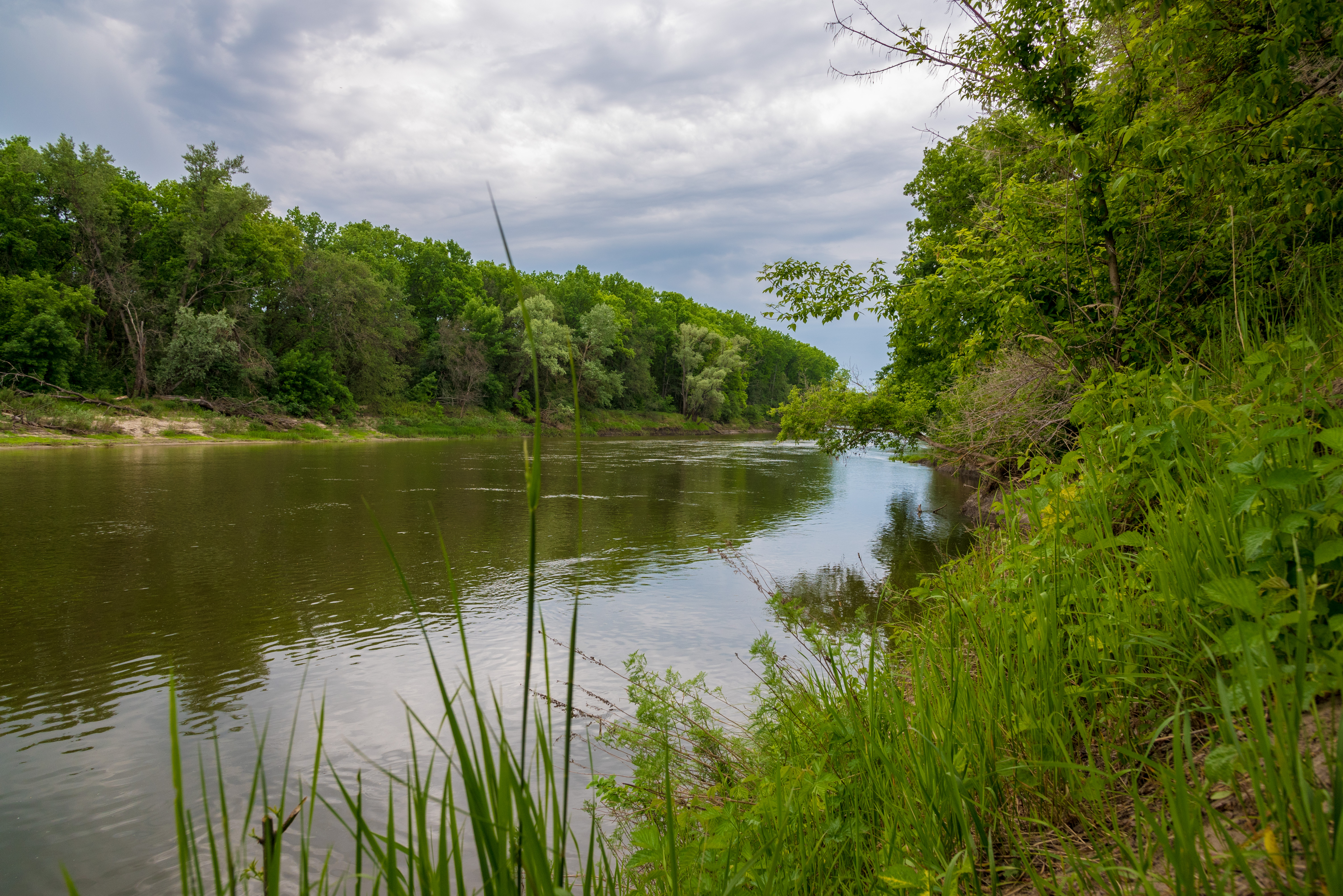 р. Хопер в пределах Воронежской области, Борисоглебский городской округ This image is related to the protected area of Russia number 3610259